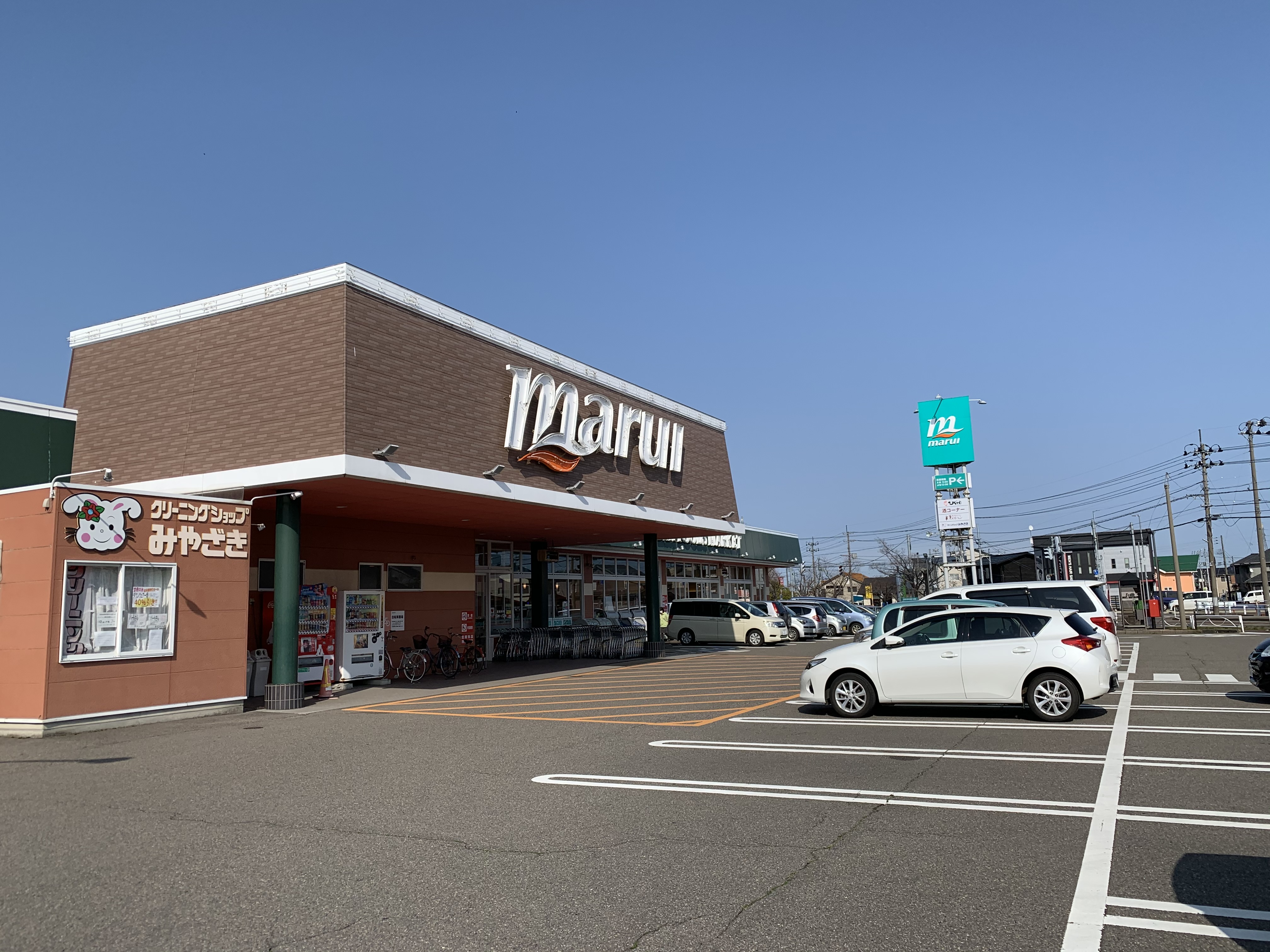 マルイ吉田店（2020年3月）